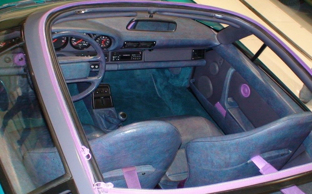 Porsche Type Panamericana, Porsche Museum Stuttgart Zuffenhausen